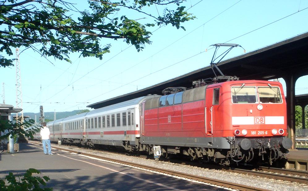 181205 mit InterCity 432 nach Luxemburg in Wittlich Hbf